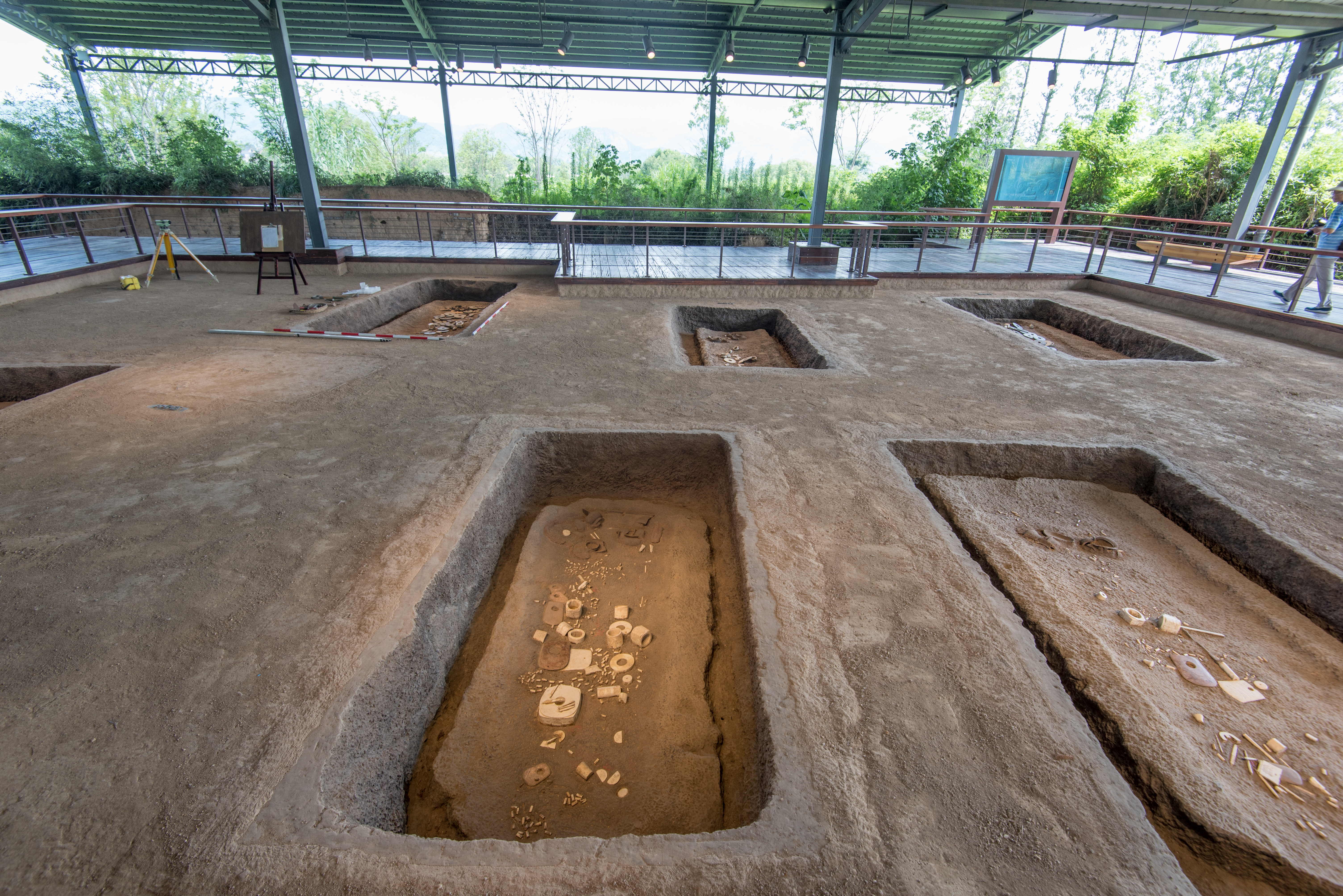 良渚考古遗址公园——反山墓地复原展示